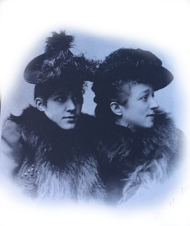 Anna med och en väninna i Paris. IMG 9253